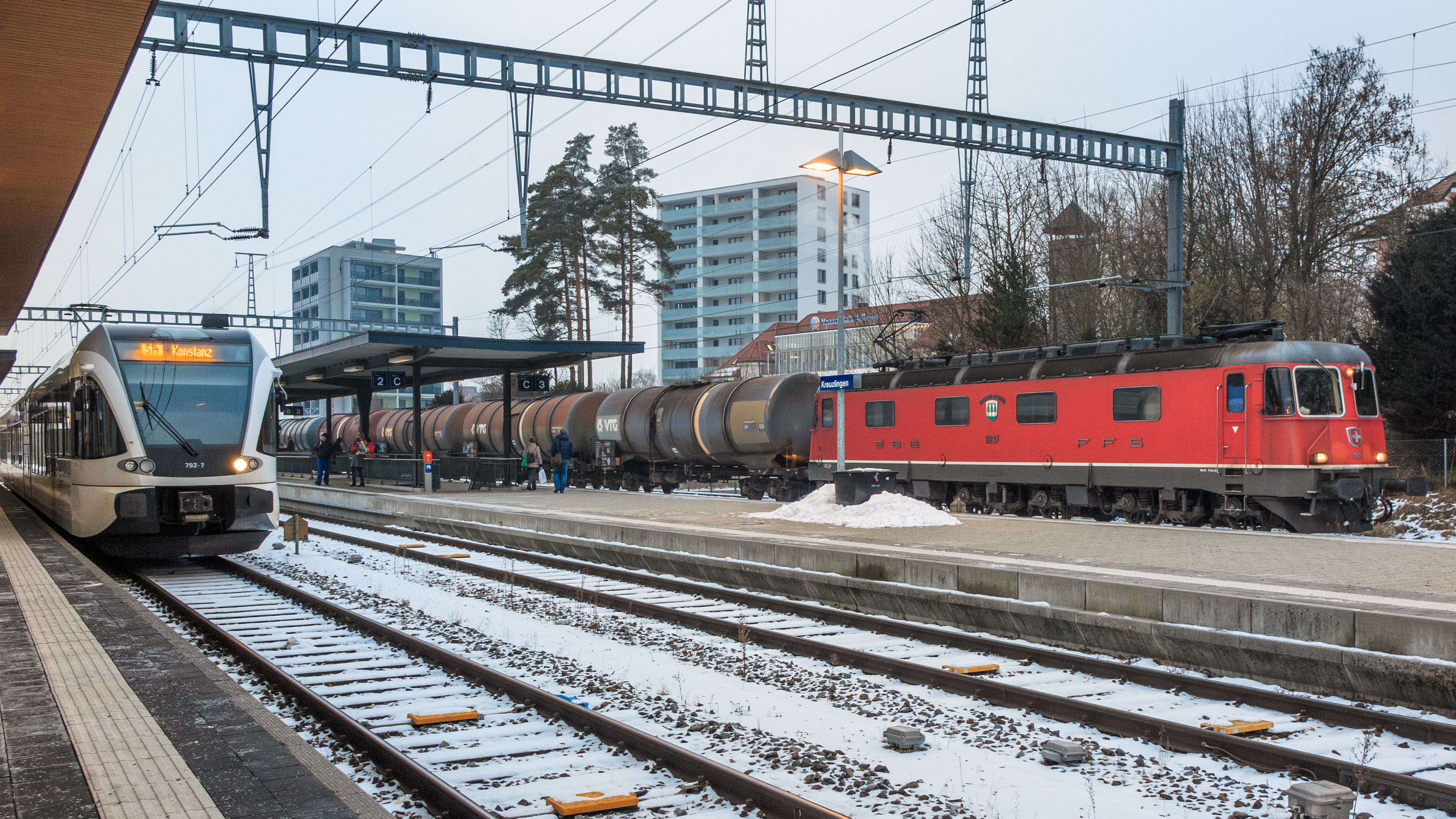 THURBO GTW und Re 620 Nr. 11637 mit Kesselwagen in Kreuzlingen